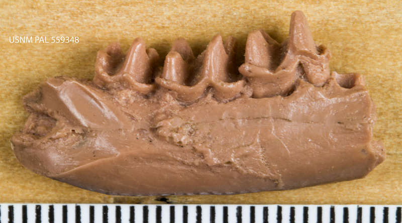 Steropodon galmani Archer et al., 1985